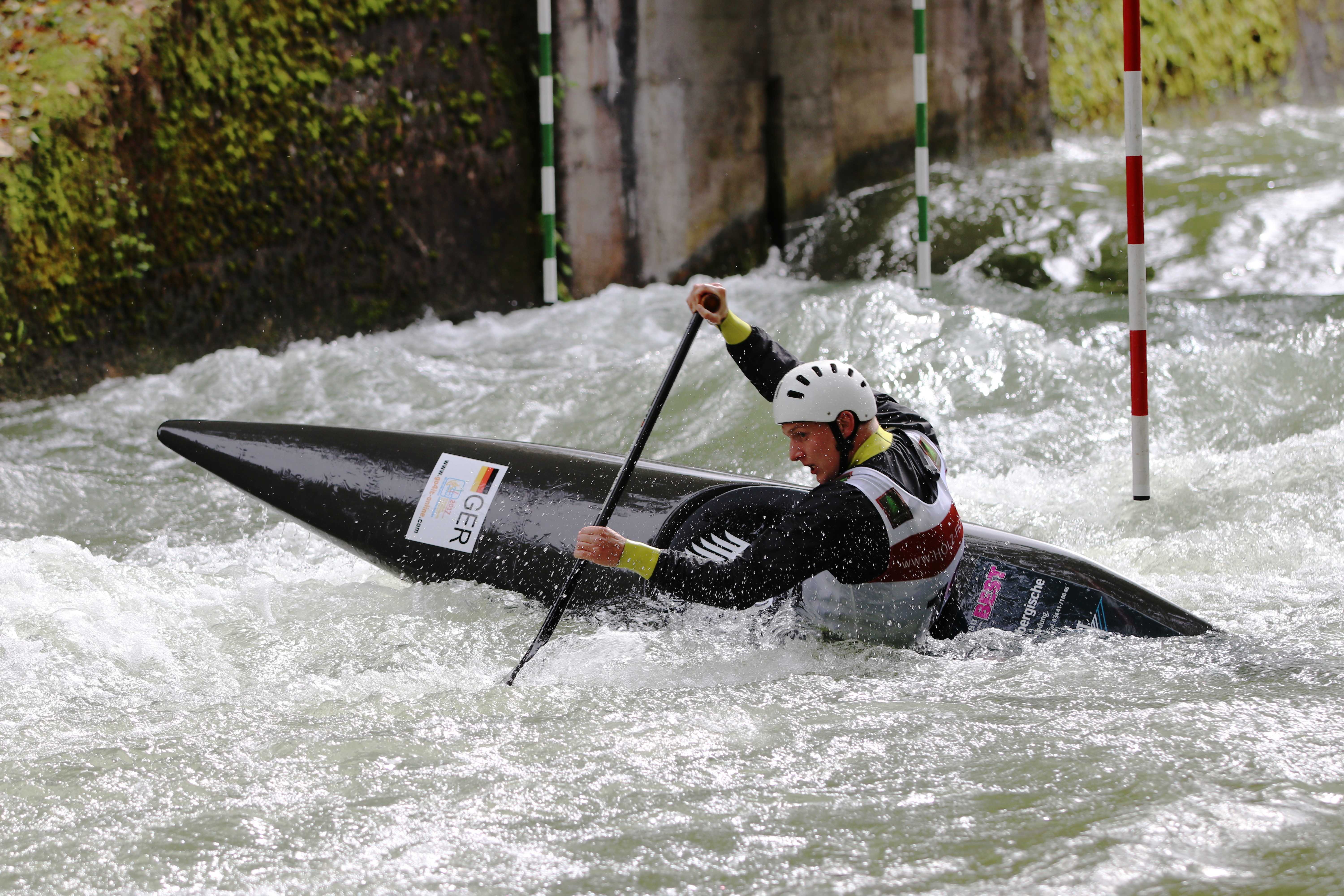 Deutsche Meisterschaft 2017 im Kanuslalom, München-Thalkirchen